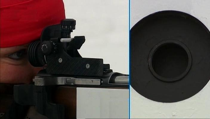 Биатлонистка стреляет по мишени